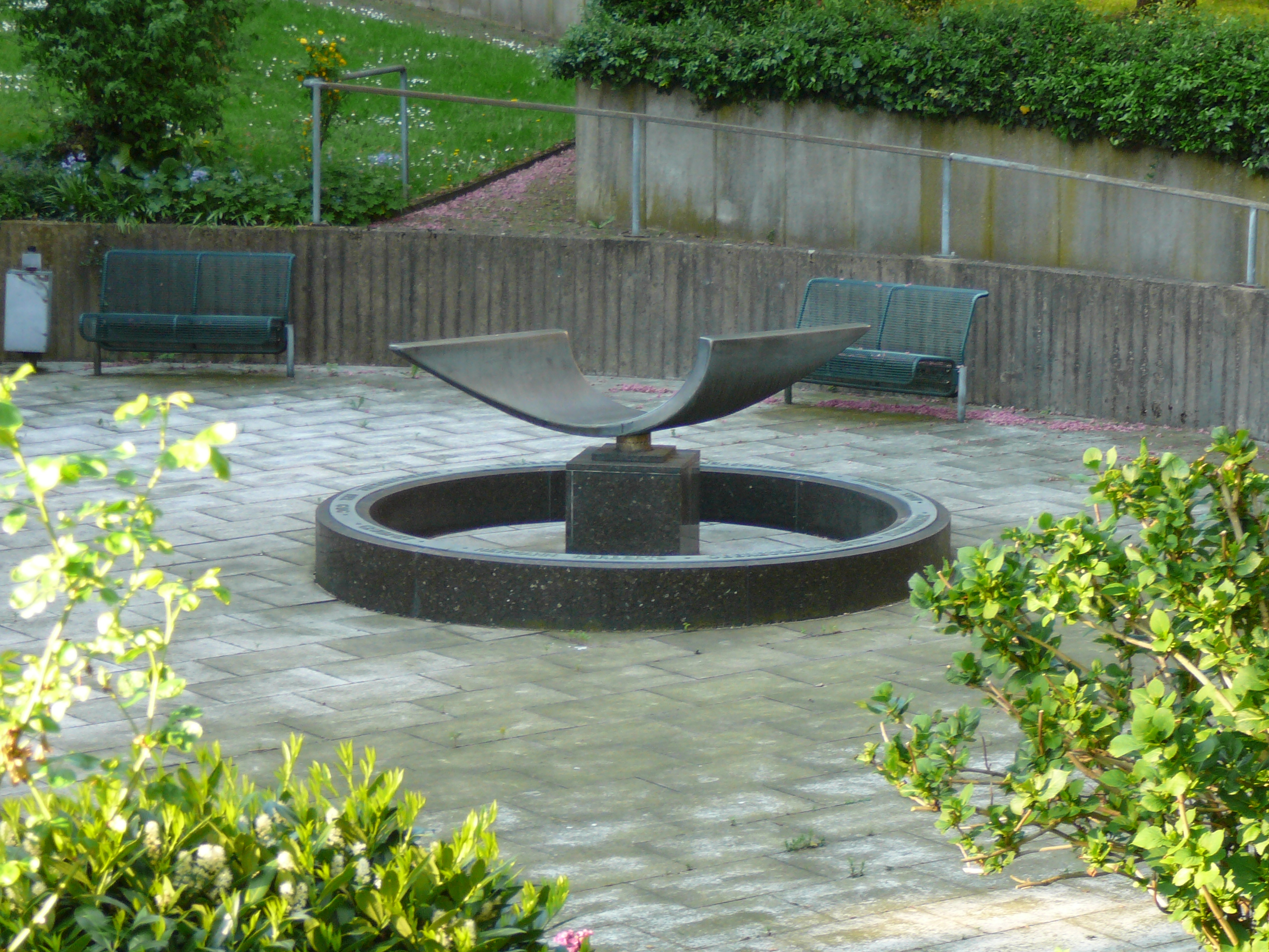 Auf dem Eigen, Wuppertal